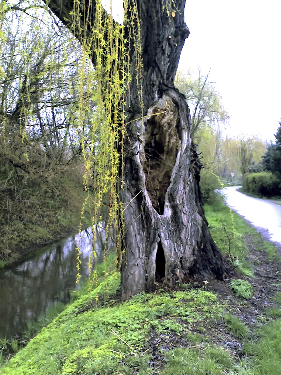 Alter Baumbestand am Ufer der Panke unterhalb des Pankebeckens Berlin-Französisch Buchholz